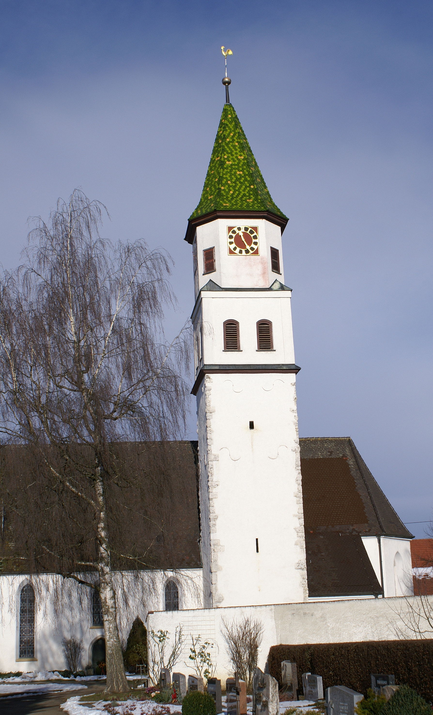 Ascher Pfarrkirche "Zu unserer lieben Frau"